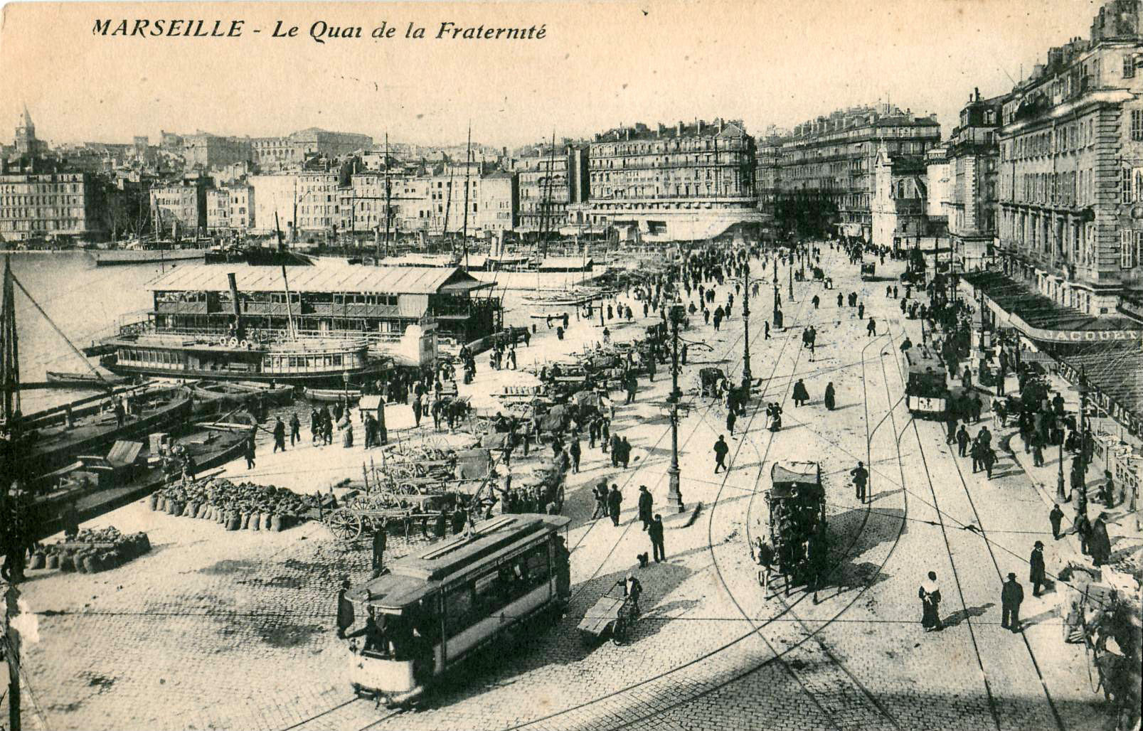 Carte postale ancienne sans mention d'éditeur : MARSEILLE - Le Quai de la Fraternité